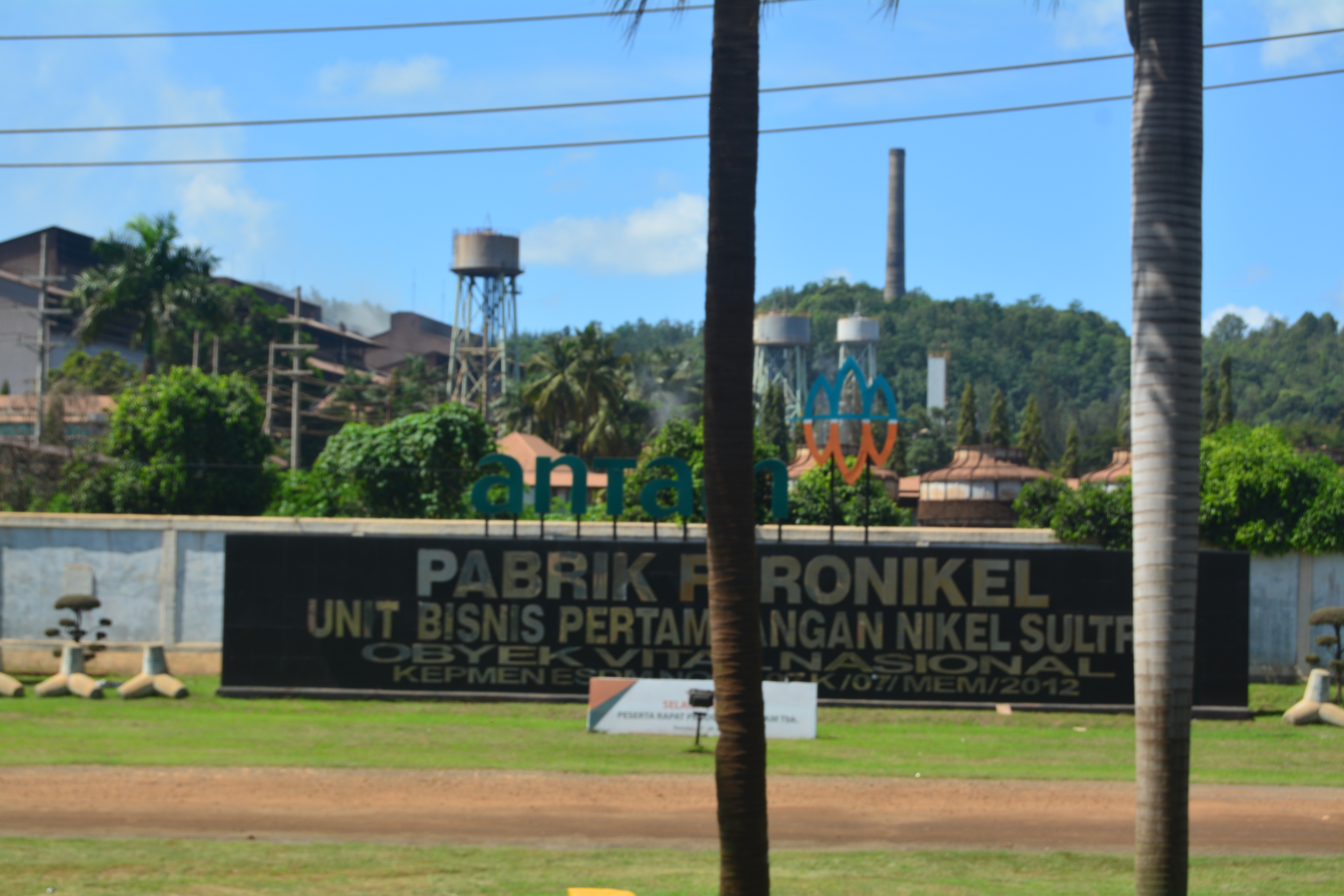 Pabrik Feronikel ANTAM di jalan poros menuju Bandara Sangia Nibandera